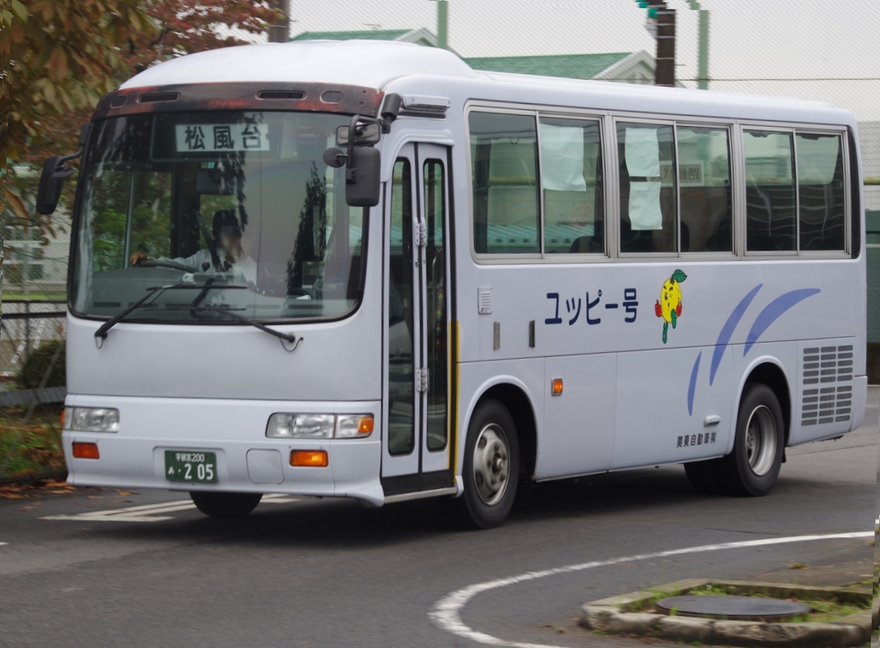 関東自動車（栃木県）の上河内地域バスで使用されている日野リエッセ